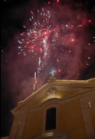 Spettacolo pirotecnico, sopra il santuario del Carmine a Palmi, al rientro della processione di Maria Santissima del Carmelo per le vie cittadine.